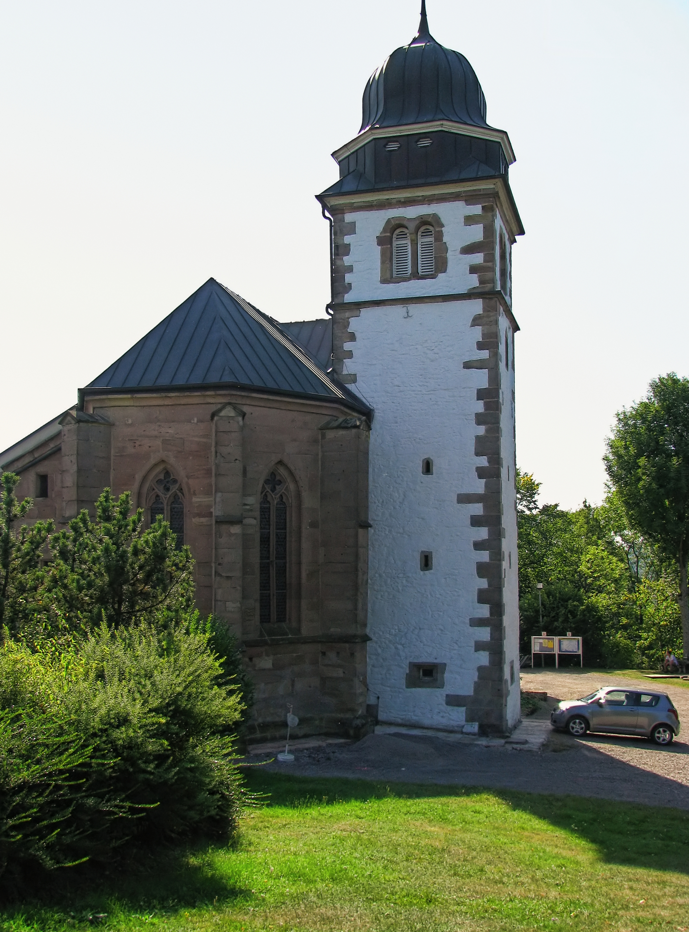 Propsteikirche St. Remigius, Remigiusberg, Landkreis Kusel; Bearbeitete Version (Objektivkorrektur, ShiftN 60%)